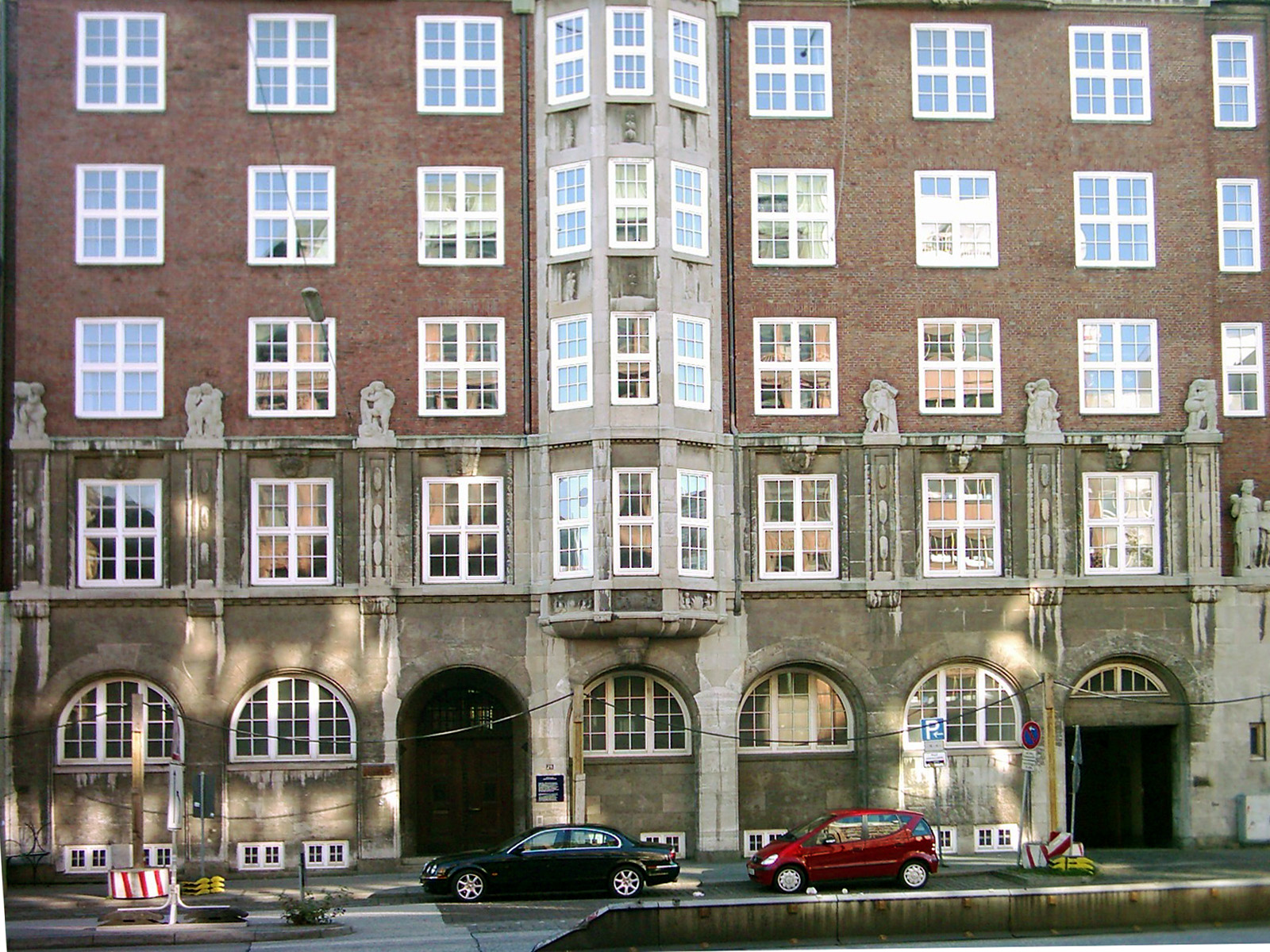 Hamburg, Dammtorstraße 25, die 1911-1913 erbaute ehemalige Oberschulbehörde. Architekt war Fritz Schumacher. Siehe auch / See also Image:Hamburg Ehemalige Oberschulbehörde 03.jpg Image:Hamburg Ehemalige Oberschulbehörde Tafel 02.jpg